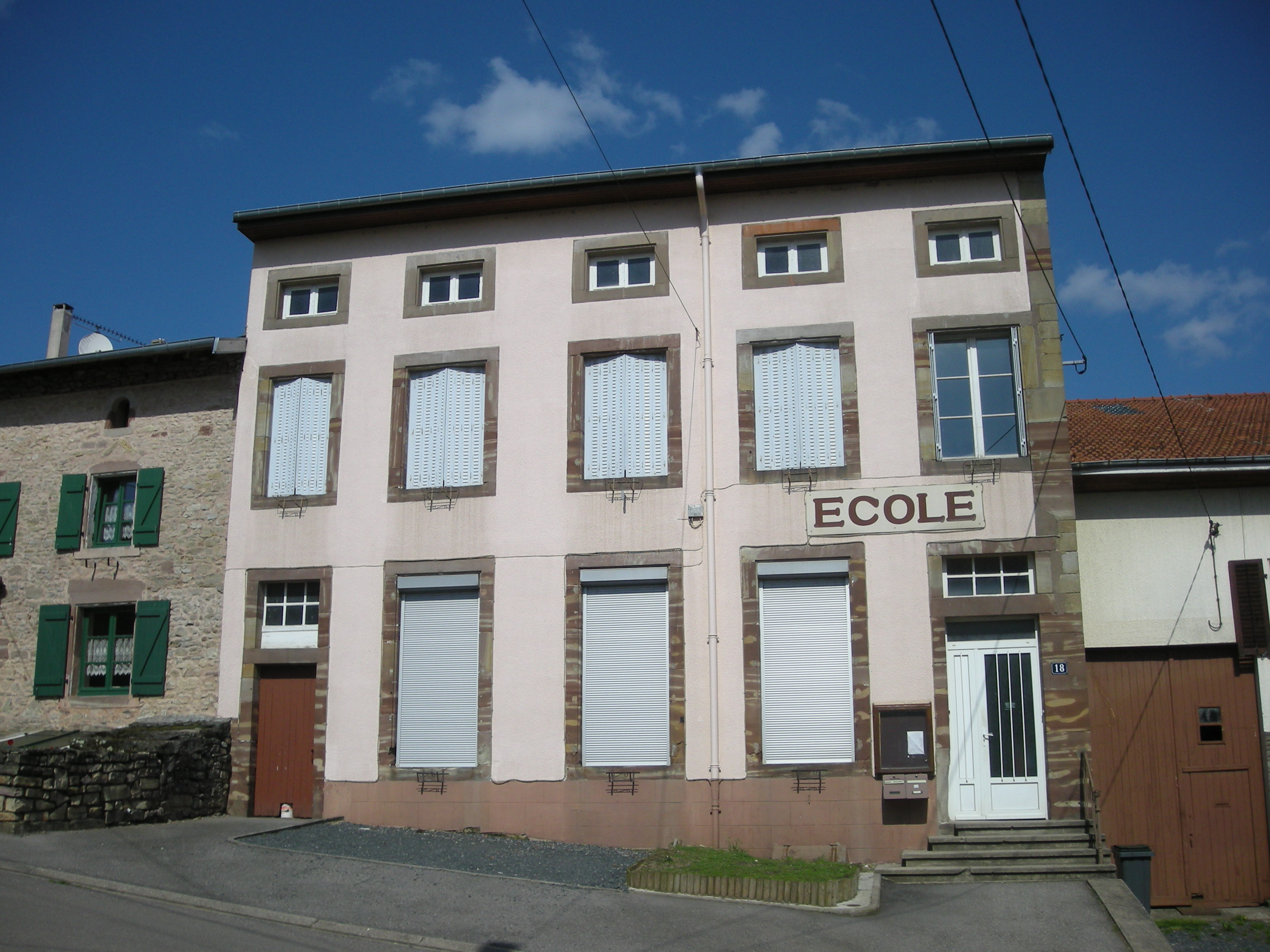 L'école de Fontenoy-la-Joûte (54)